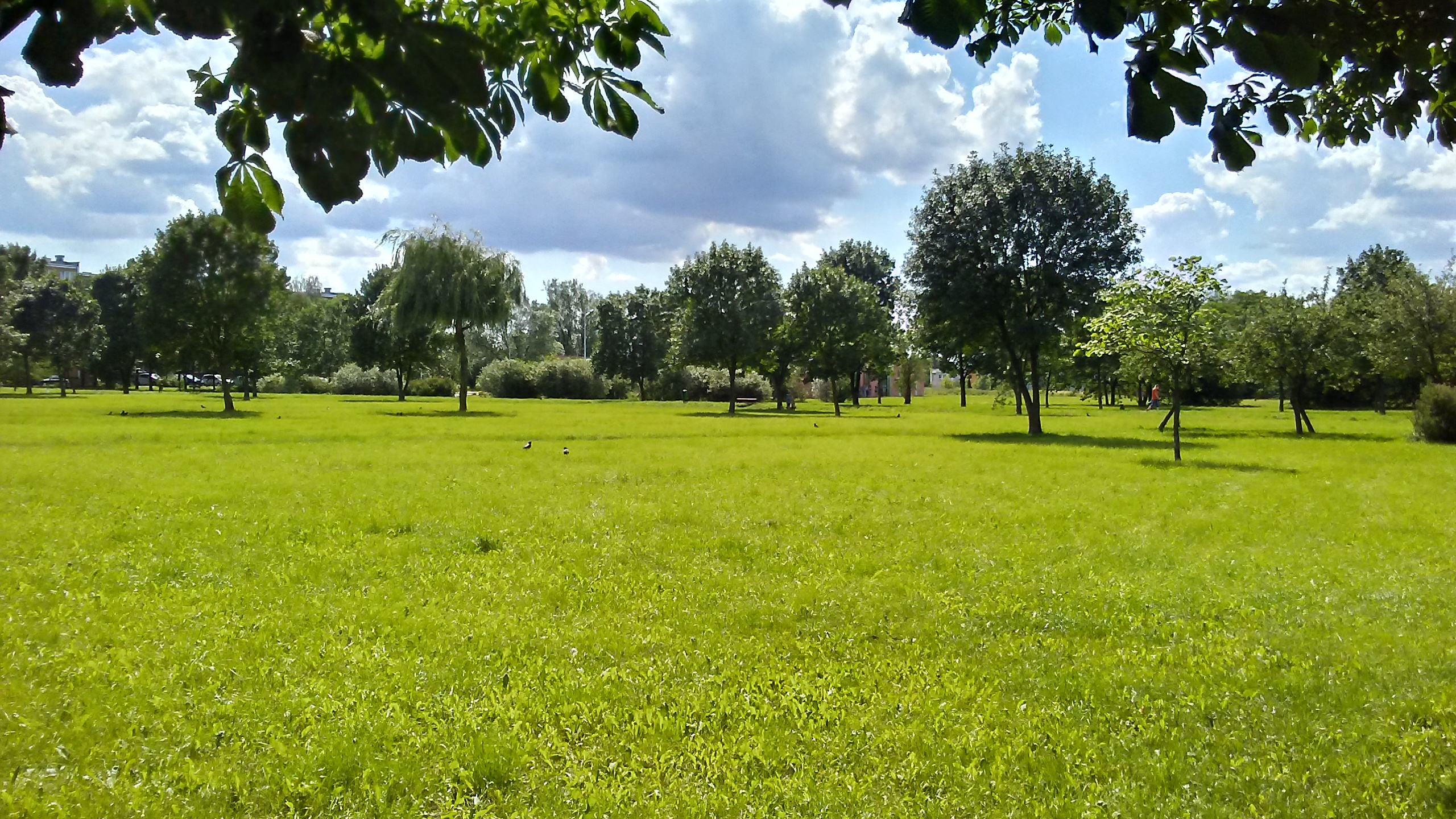 Park w centrum osiedla Niebrów, Tomaszów Mazowiecki